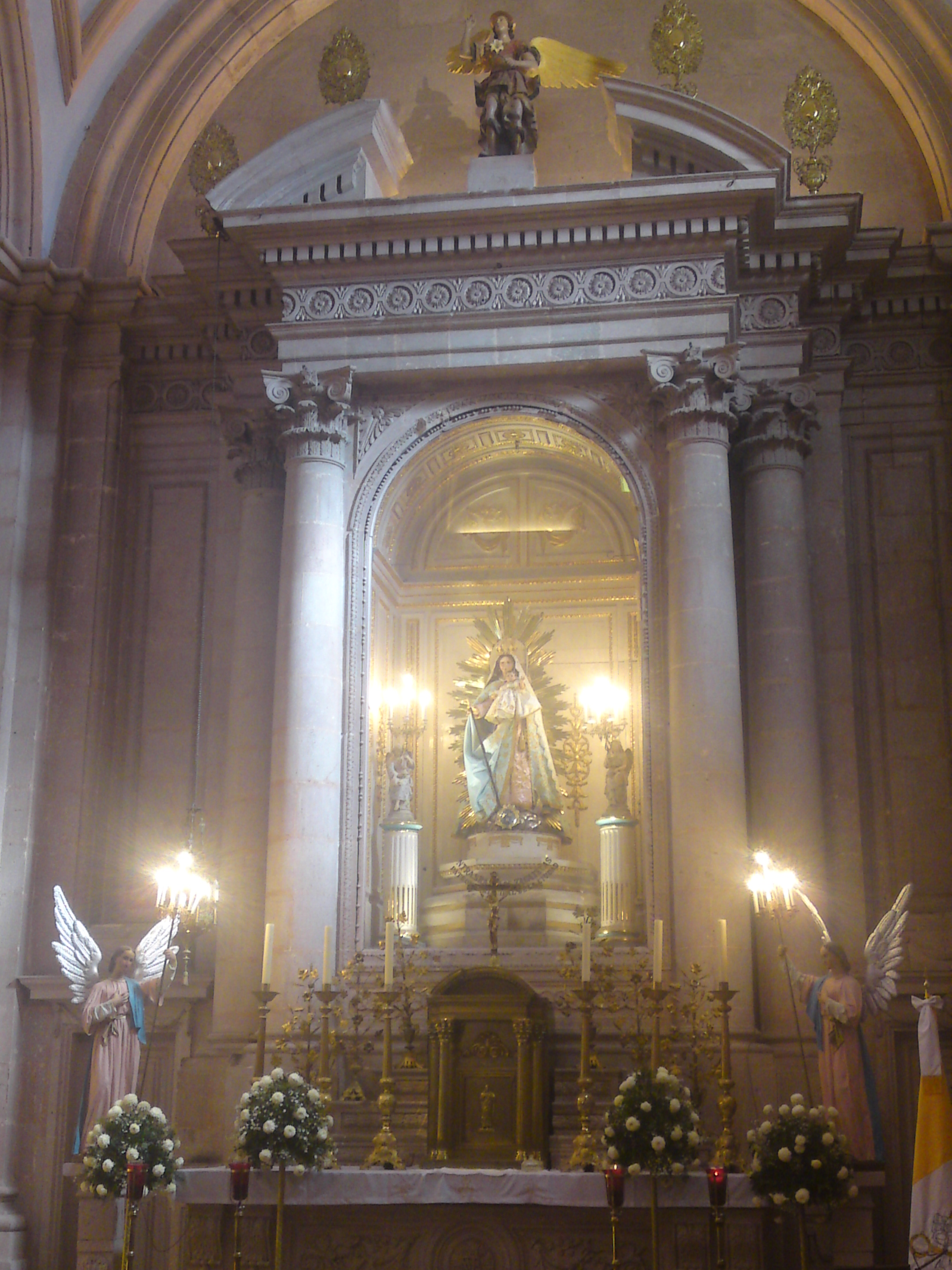 Capilla principal al interior de la Catedral, de estilo neoclásico dedicada a Nuestra Señora de los Zacatecas